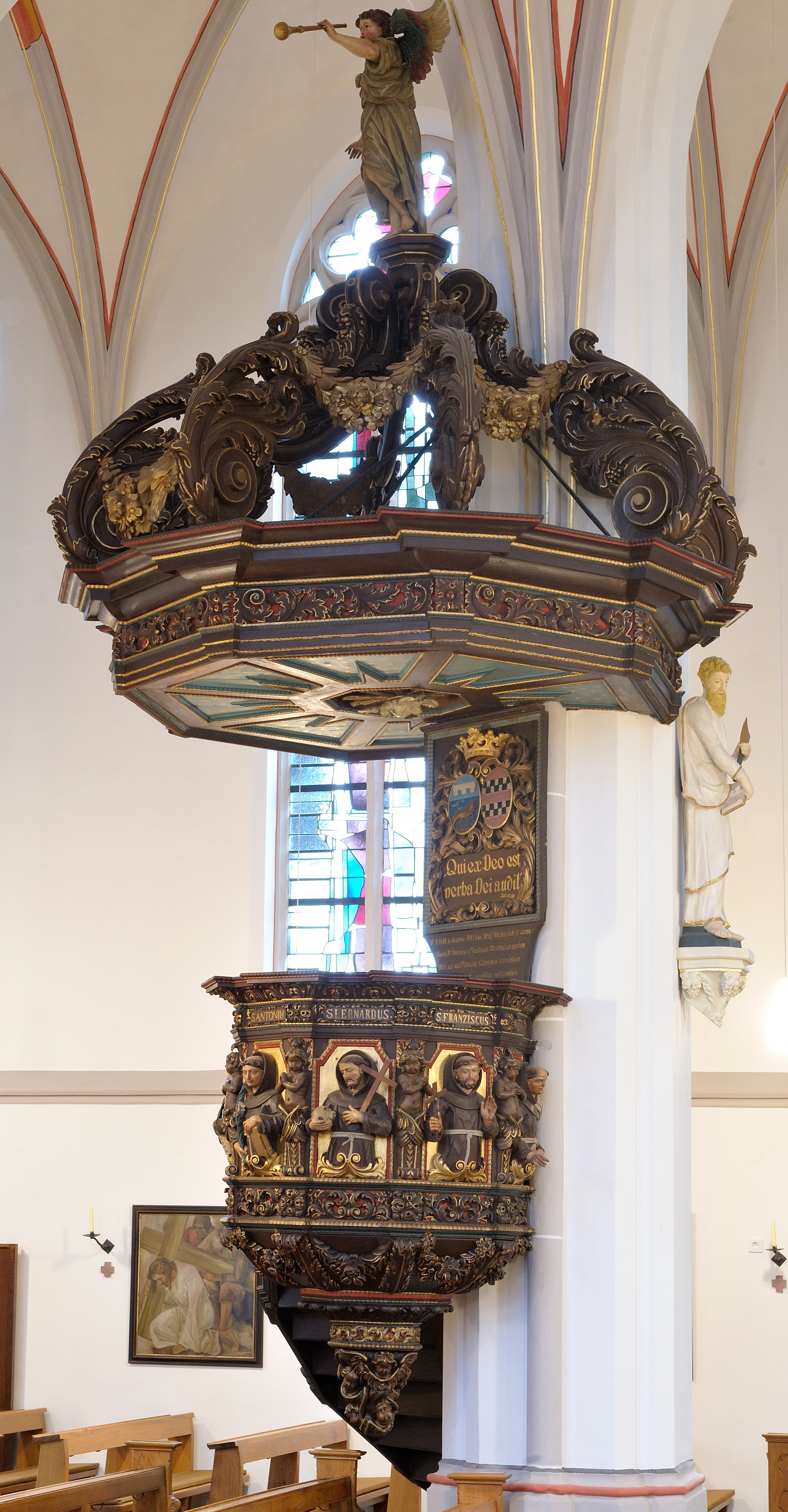 Die Barockkanzel aus St. Pankratius Paffendorf wird in das Jahr 1619 datiert. Das Foto zeigt den Zustand nach der Restaurierung im Jahre 2012.